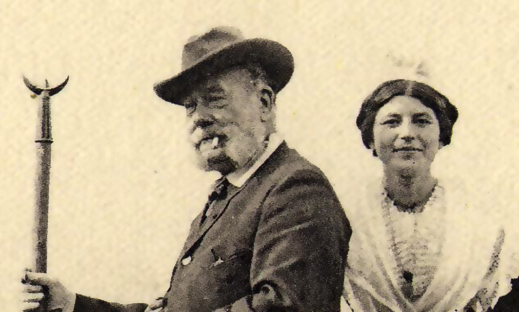 Yvan Pranishnikoff (1841-1909), peintre russe, préhistorien français et personnalité de Camargue